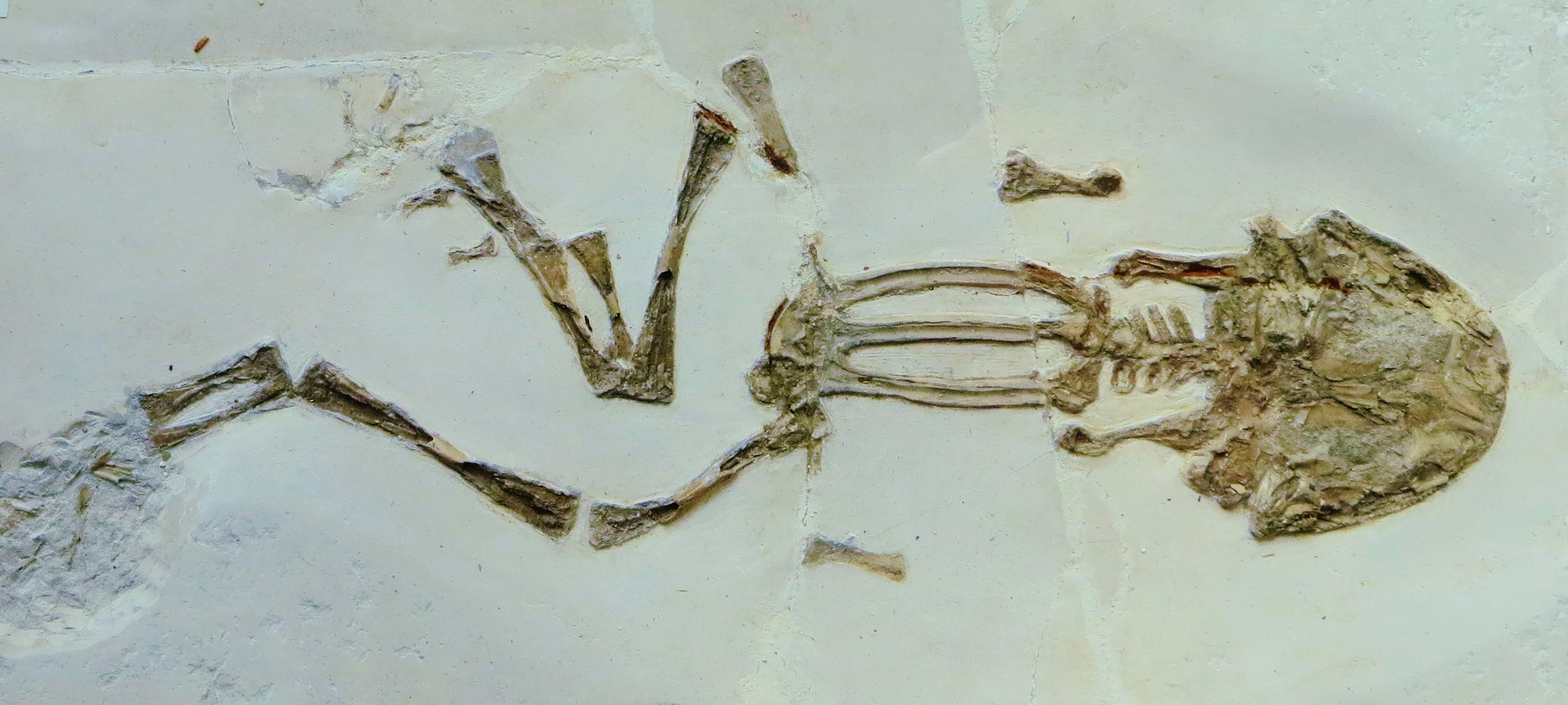 Fossil of Latonia, an extinct frog- Took the picture at Teylers Museum, Haarlem